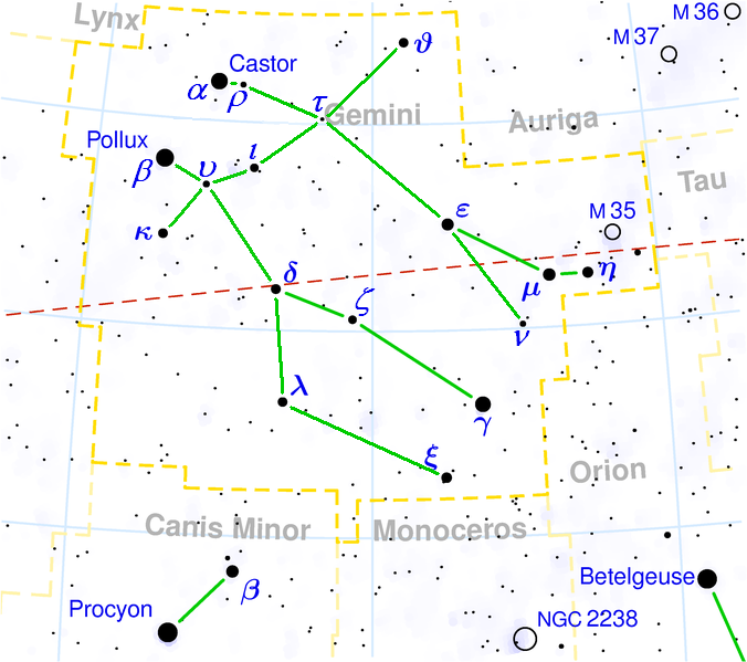 Gemini constellation map visualization